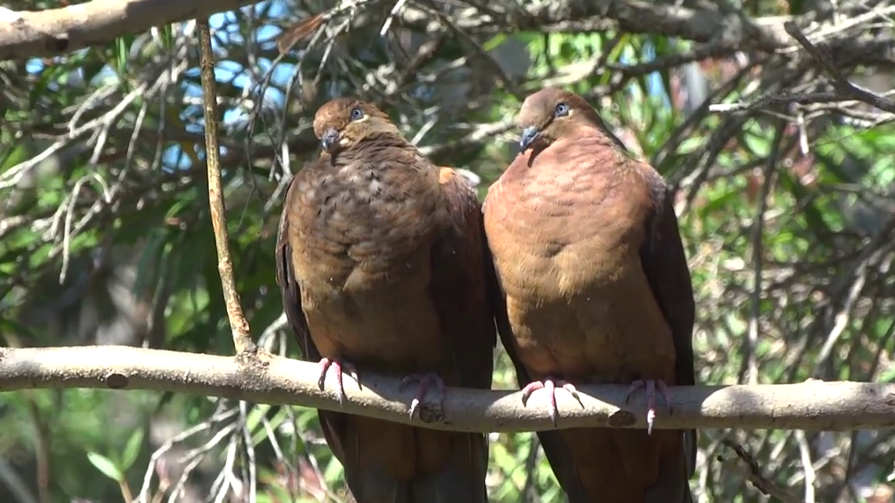 Burung Uncal kouran warna coklat